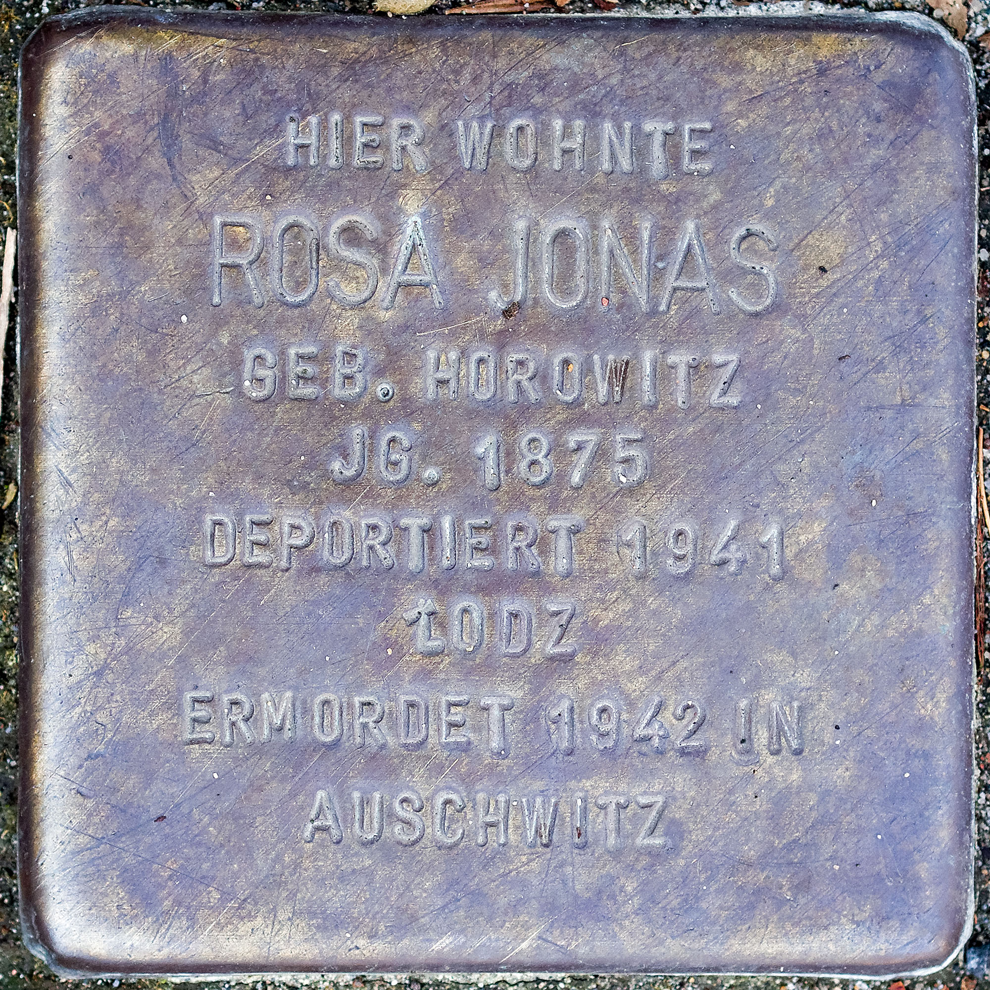 Stolpersteine MG: Jonas, Rosa